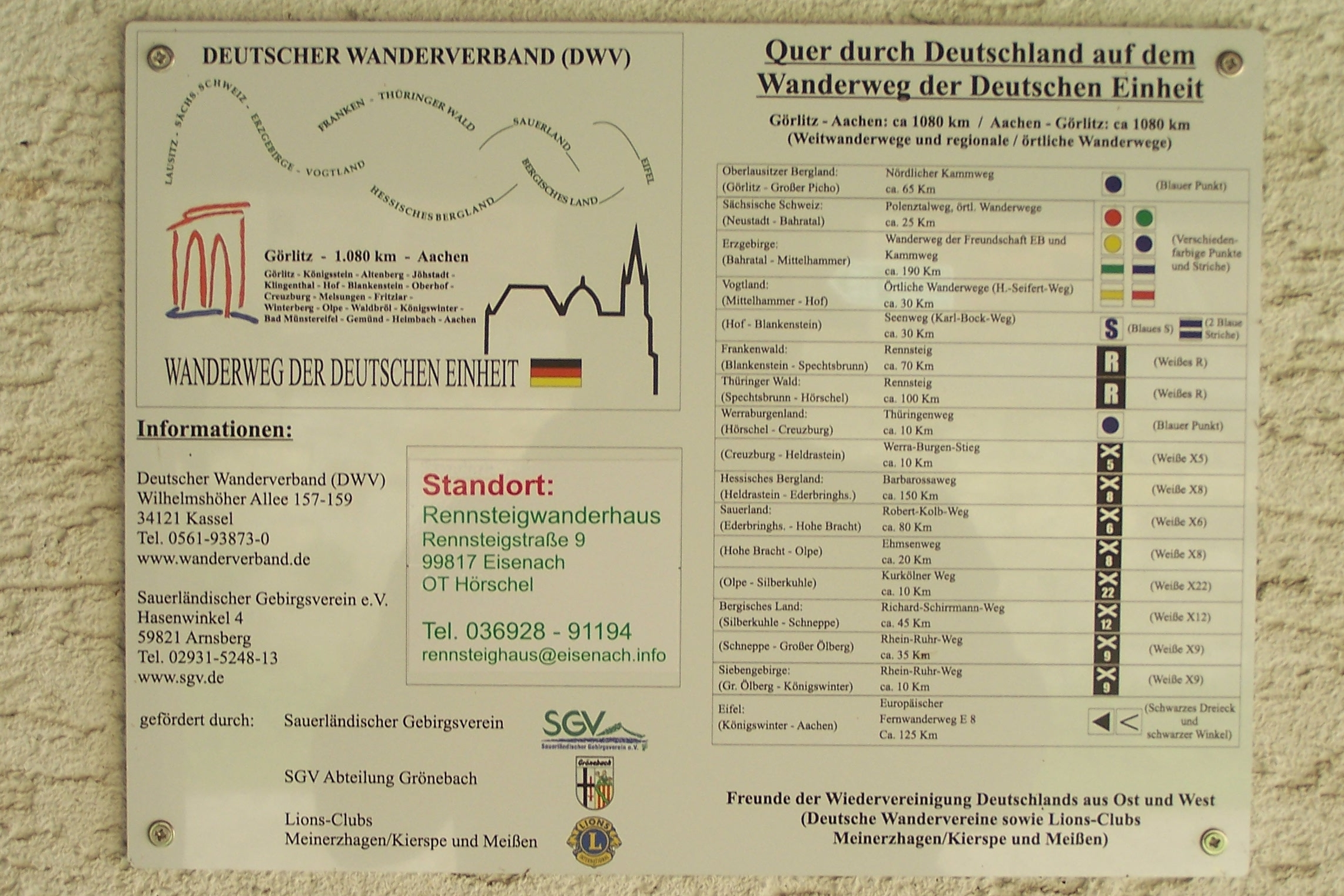 Der Fernwanderweg der Deutschen Einheit kreuzt auch das Werratal bei Eisenach - Infotafel am Rennsteigbeginn in Hörschel.